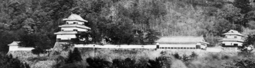 Tottori Castle Ninomaru